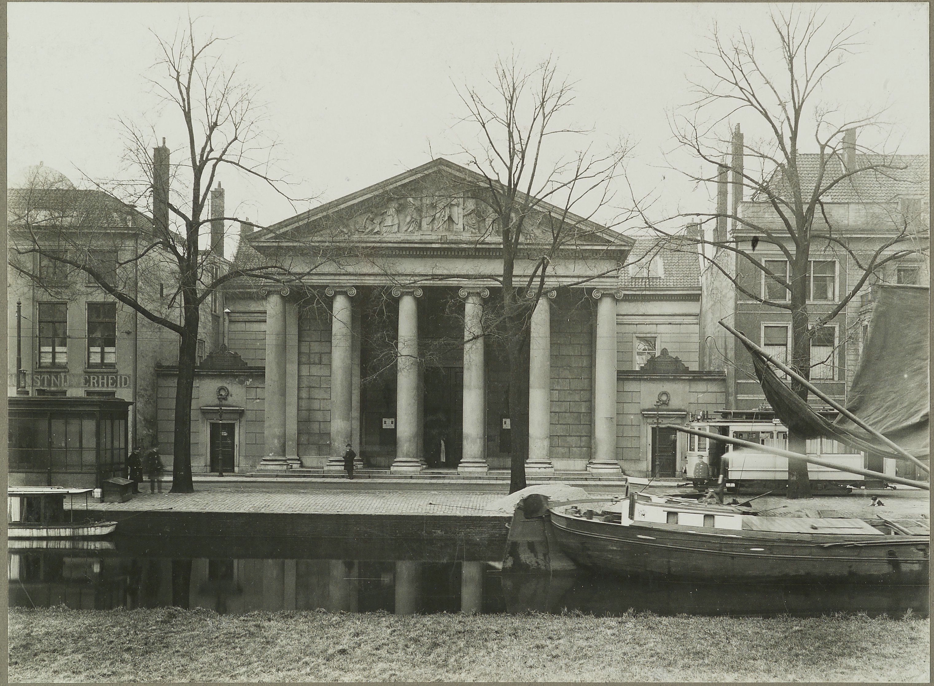 Academie: Voorgevel in omgeving (opmerking: Zie ook neg 8.030)